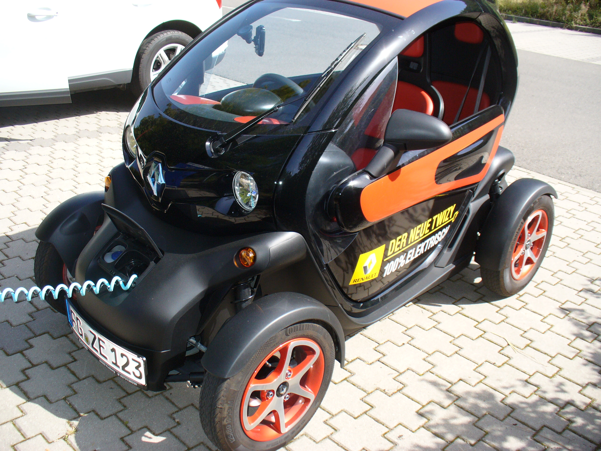 Renault Twizy beim Laden mit dem bordeigenen Spiralkabel an 230 Volt. Der Bordlader läd standardmäßig mit etwas mehr als 2 kW.